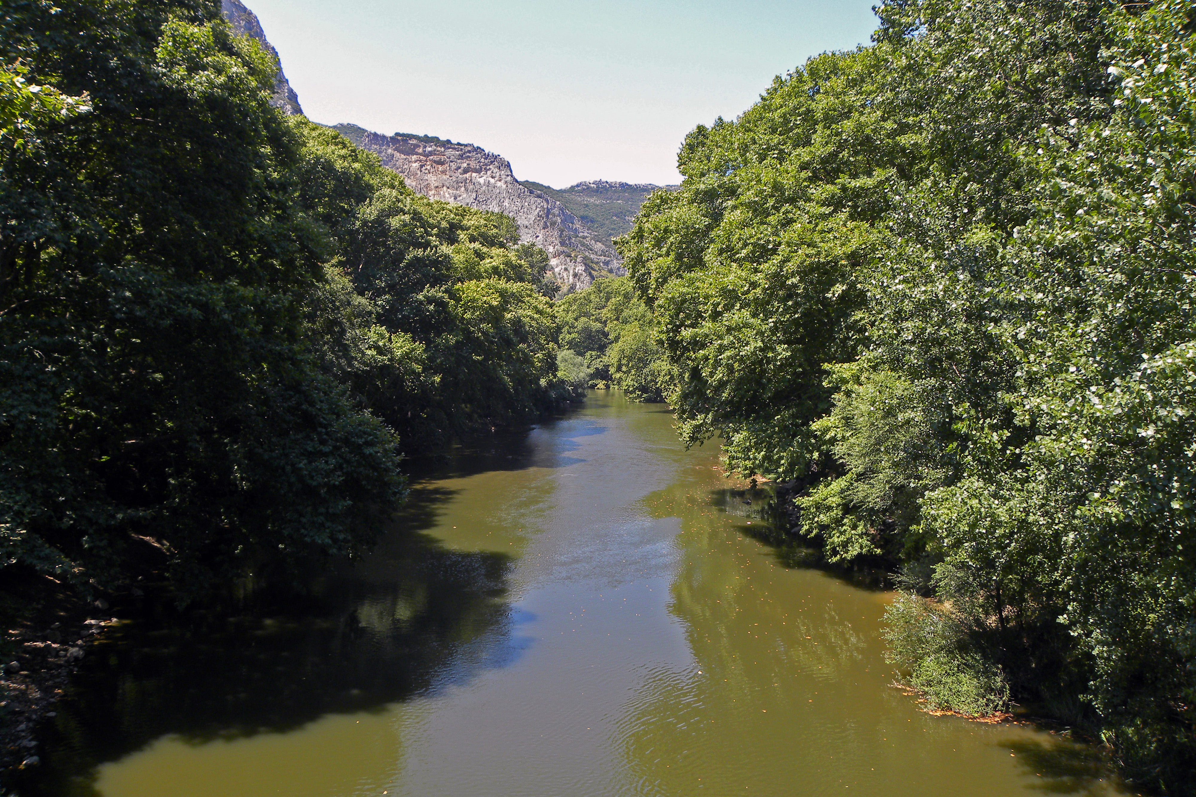 Τέμπη